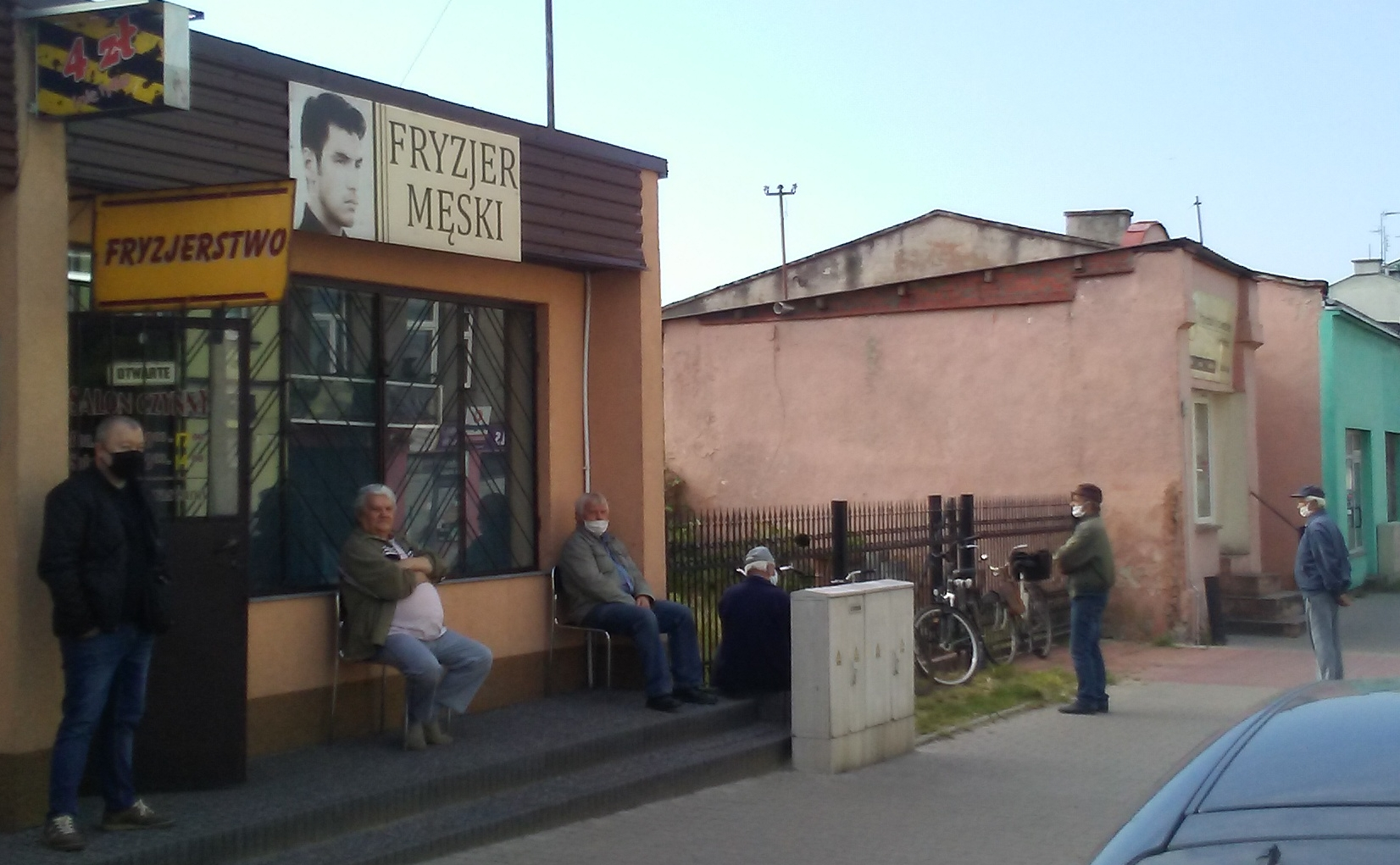 Fryzjer męski po przerwie epidemicznej SARS-CoV-2, Tomaszów Mazowiecki.